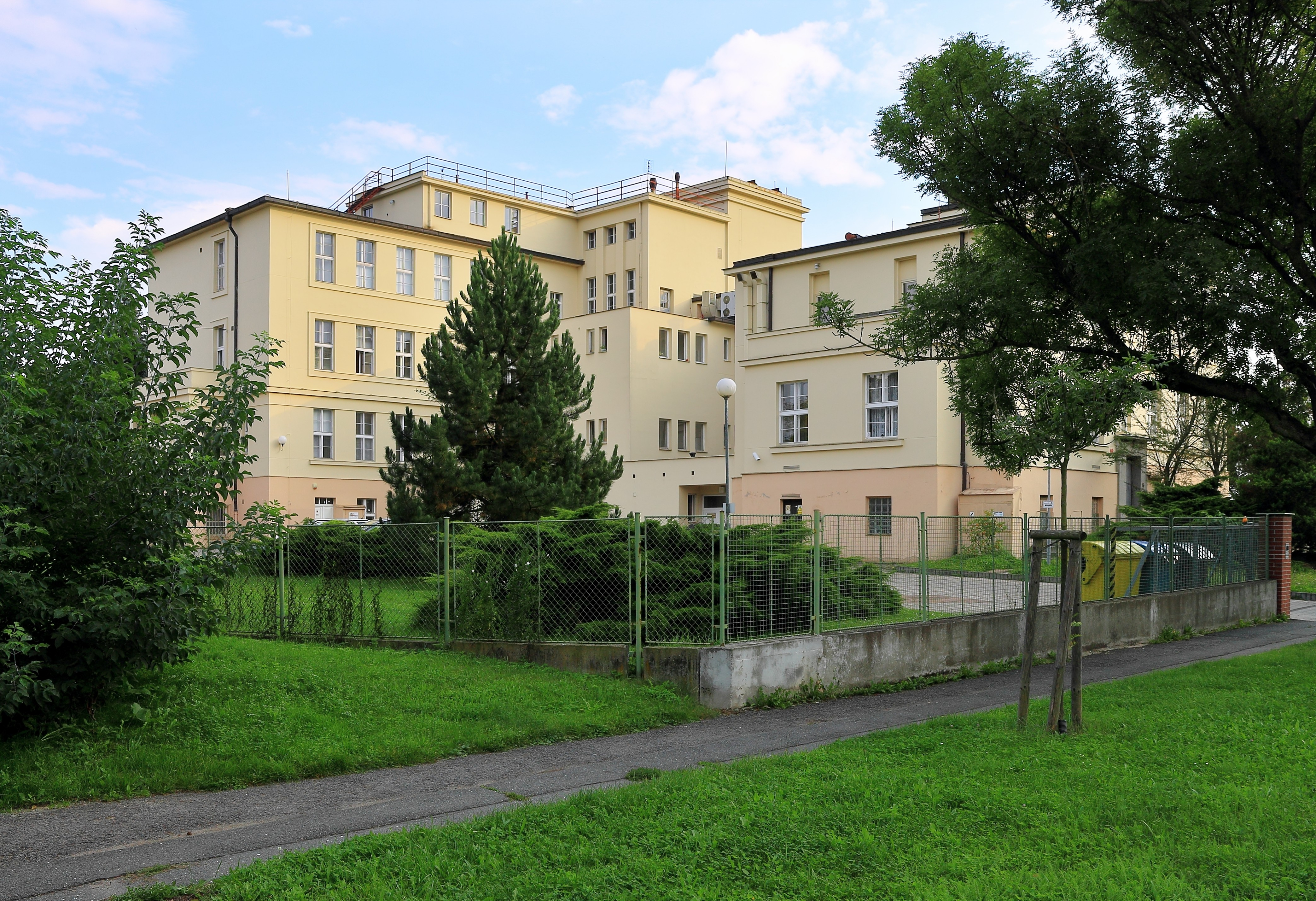 Procházkův výzkumný ústav, Plzeň 1-Severní Předměstí, Karlovarská 585/48, Lidická 585/2, Plzeň.